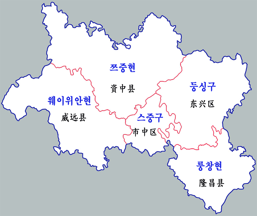 네이장시 현급행정구역